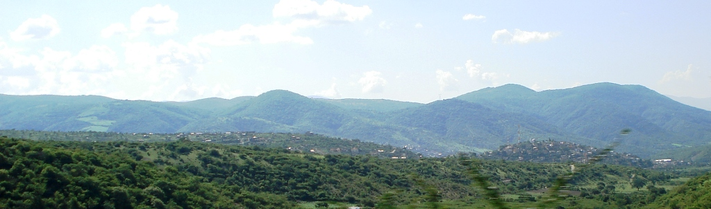 Fotografía de la ciudad de Zumpango del Río, Guerrero, desde la Autopista del Sol.